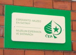 Tabulo de la Esperantomuzeo en Svitavy